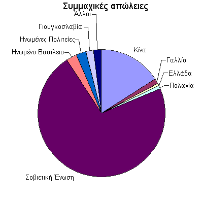 Aπώλειες των Συμμάχων στο Β' Παγκόσμιο Πόλεμο